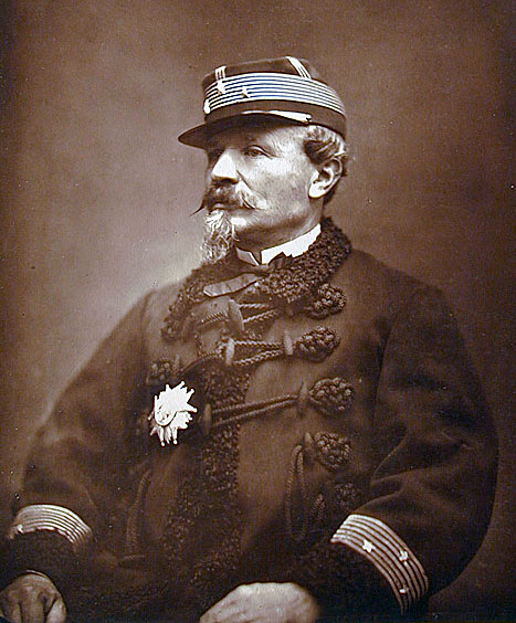 Antoine Chanzy circa 1880